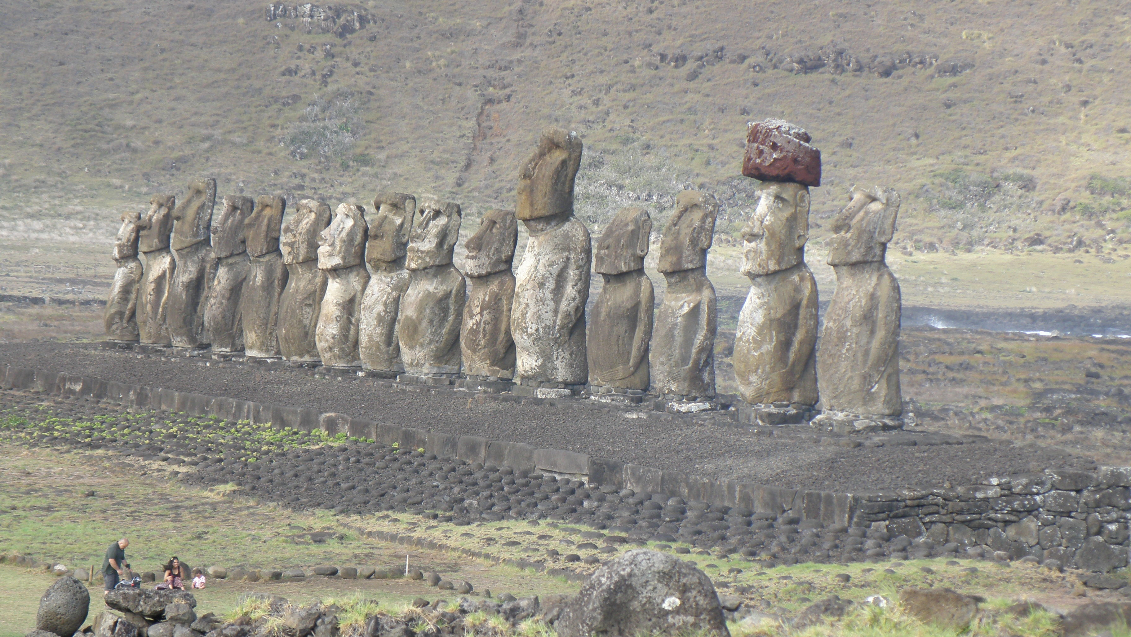 Plaża Tongariki z rzeźbami moai. Plaża z (podobno) najpiękniejszym świtem na ziemi.